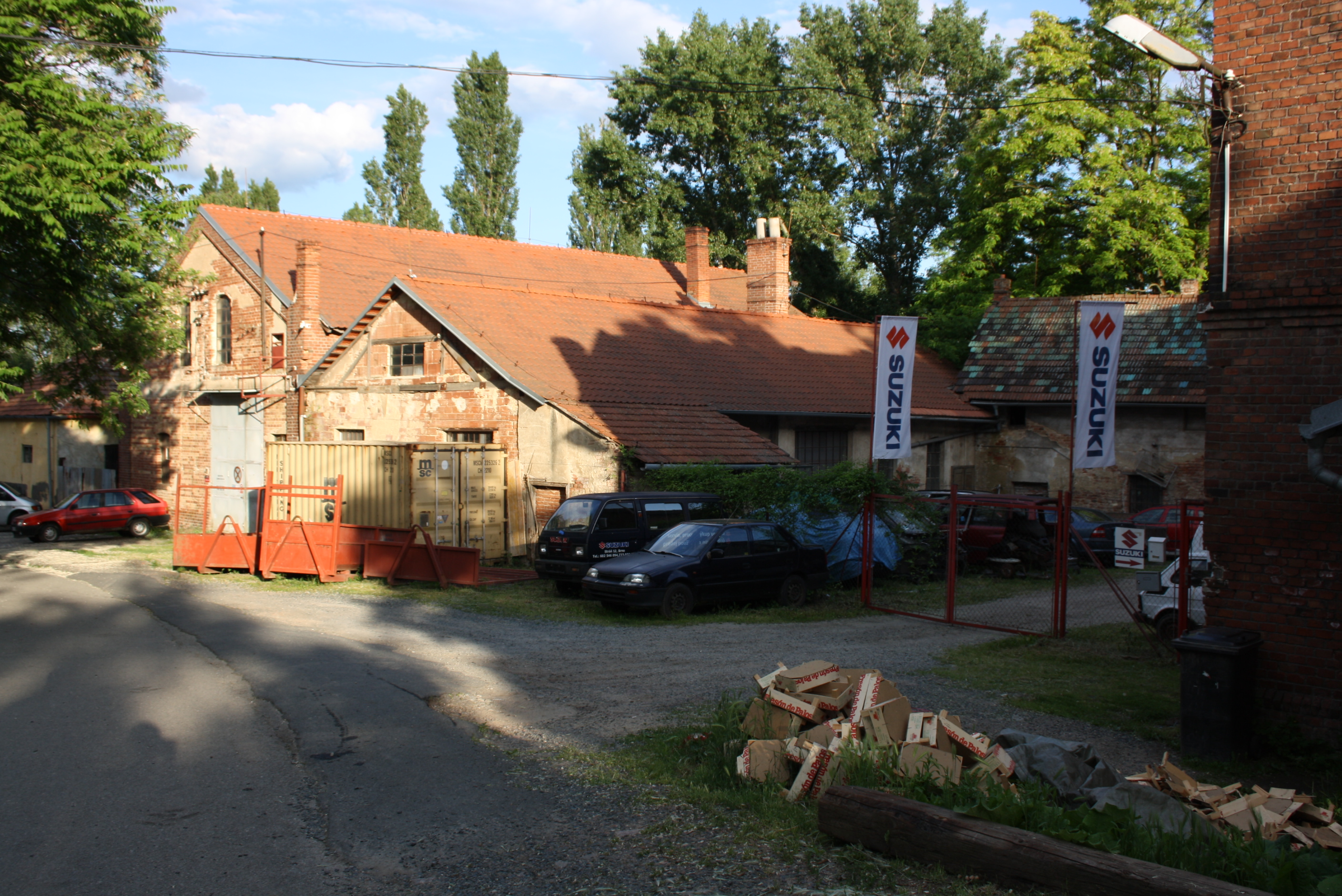 Cihlové budovy při vjezdu do areálu někdejší Kohnovy cihelny v Brně-Štýřicích pod vrcholem Červeného kopce